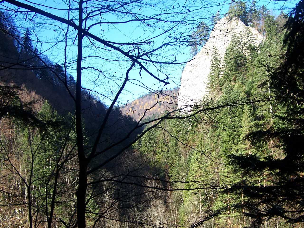 Ślimakowa Skała i wąwóz Pieńskiego Potoku. Widok z Drogi Pienińskiej